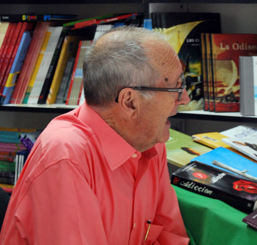 Andrés Vázquez de Sola firmando libros en la Feria del Libro de Madrid.